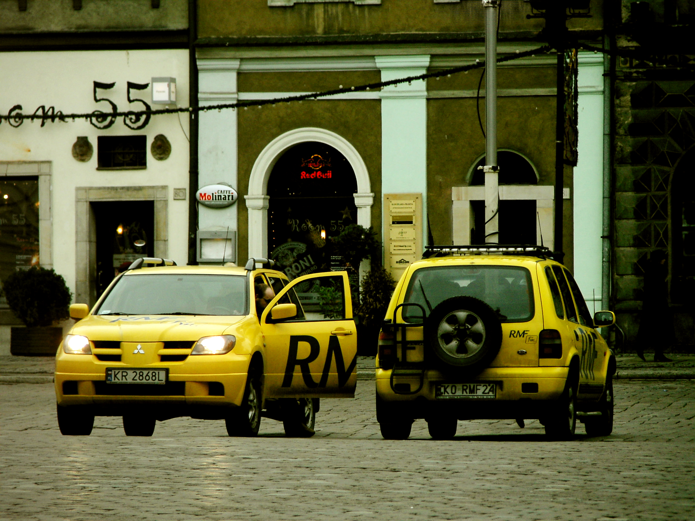 Wóz reporterski Radia RMF FM. Kia Sportage i Mitsubishi Outlander. Stary Rynek Poznań.